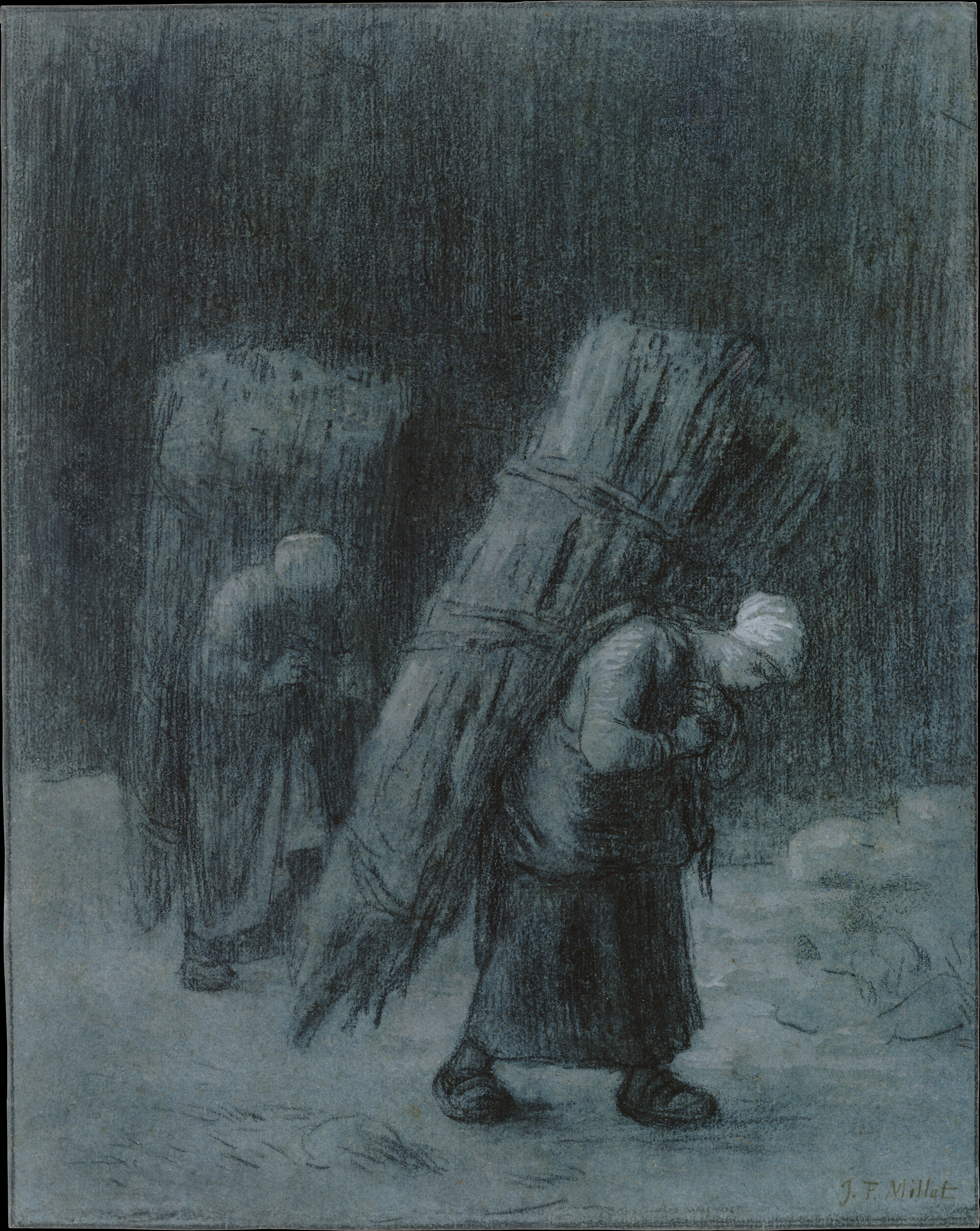 Drawing; Drawings